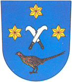 Horní Dunajovice - znak obce.